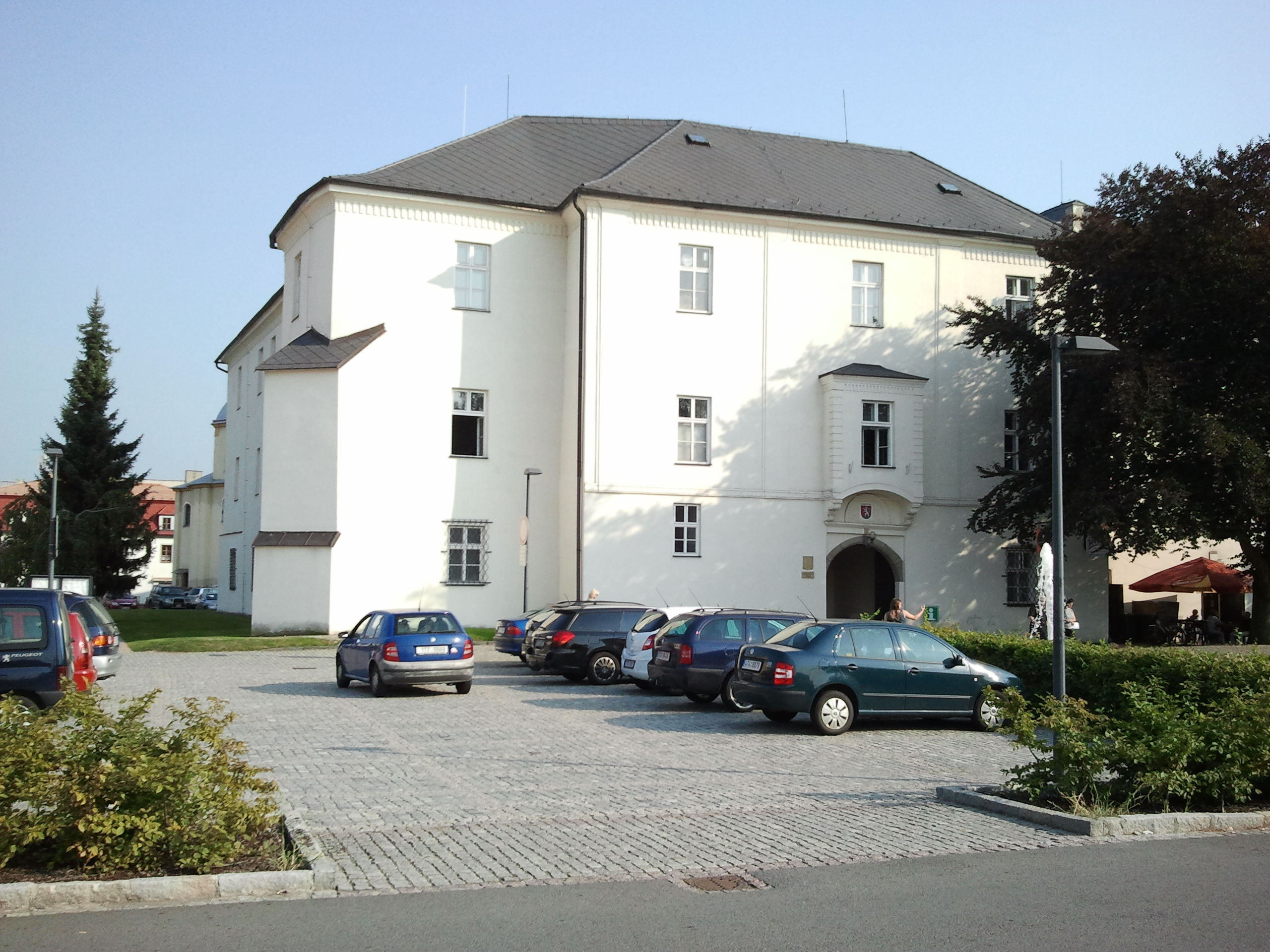 Zámek Klimkovice, nám. 1, Klimkovice